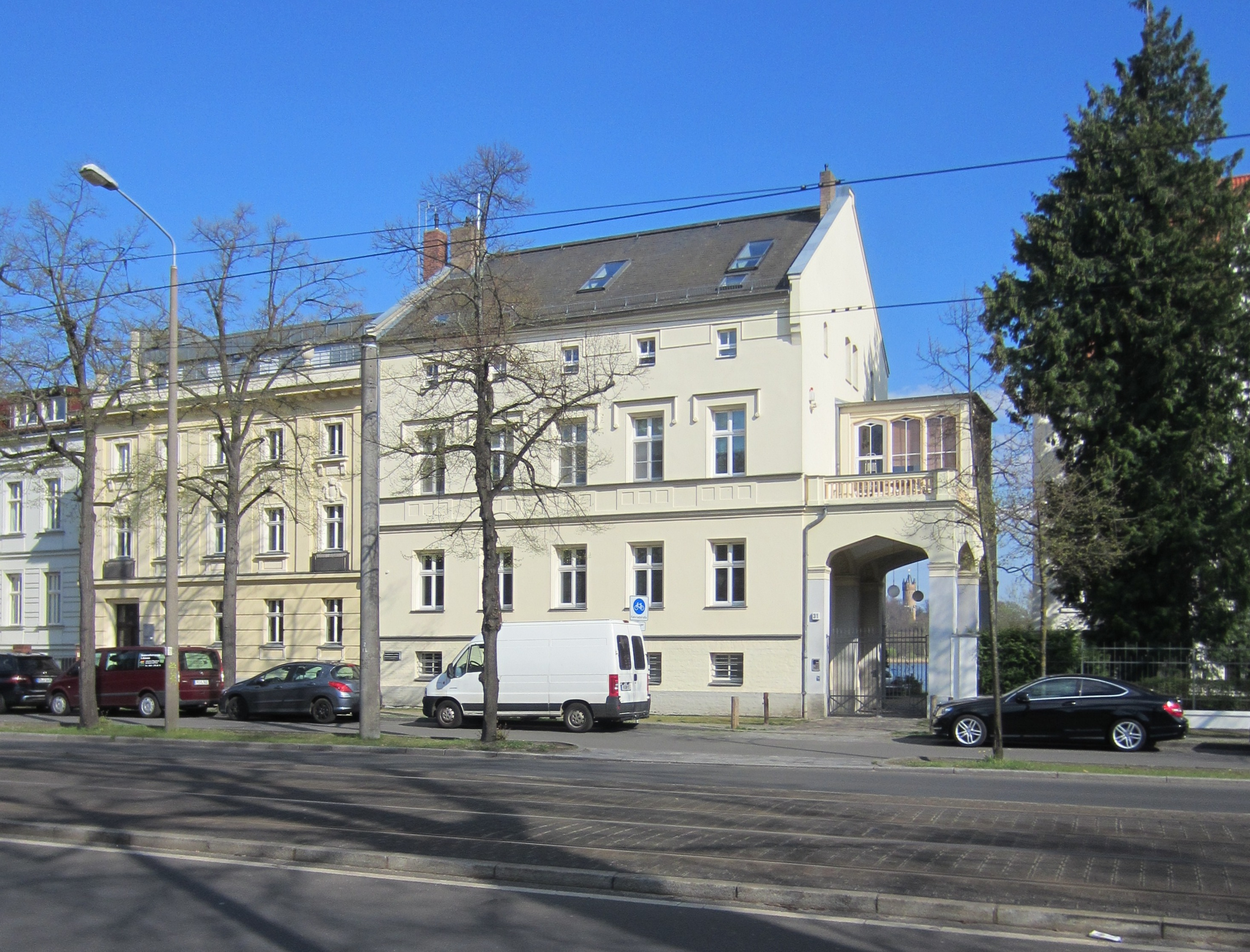 Denkmalgeschütztes Wohnhaus Berliner Straße 31 in Potsdam